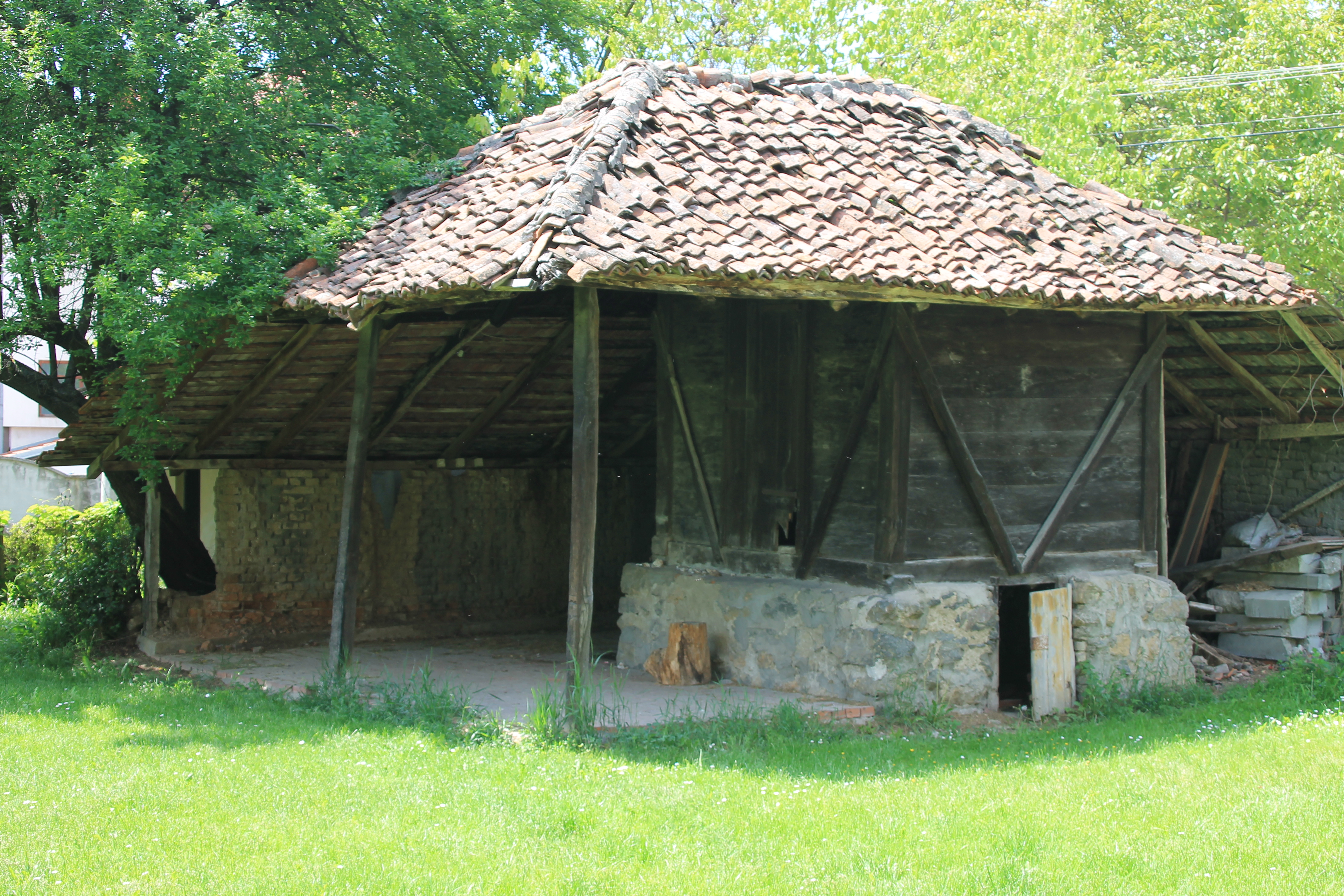 Okućnica Ilije Miloševića